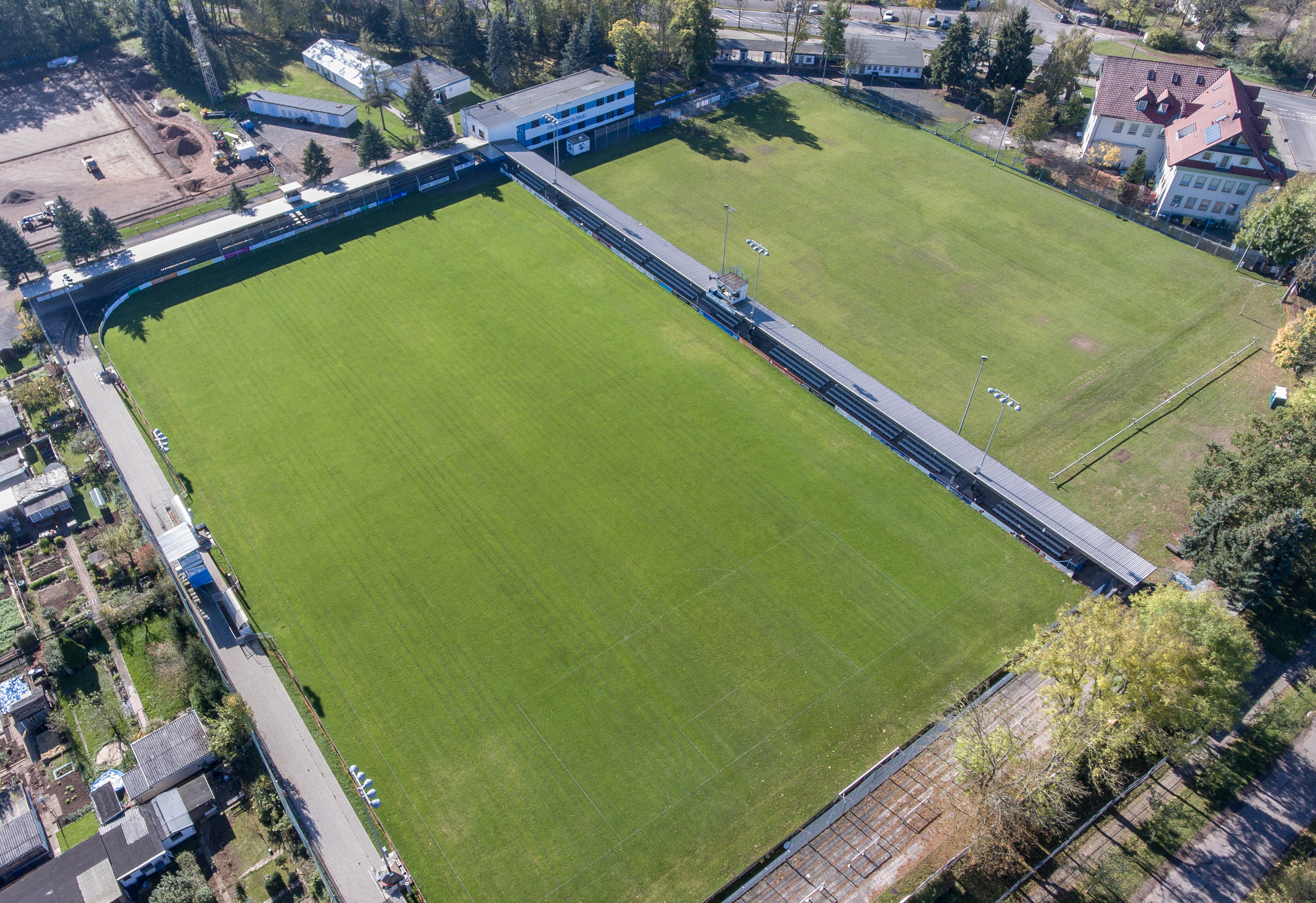 Luftbild des "Albert-Kuntz-Sportpark" in Nordhausen mit 1088 Sitz- und 7000 Stehplätzen; davon überdacht 1088/1500. Einweihung des Wacker-Sportplatzes am Kuhberg am 26. August 1923. Im Bild der Hauptplatz (Rasen) mit unmittelbar angrenzend Hotel "Am Stadtpark" mit Restaurant.